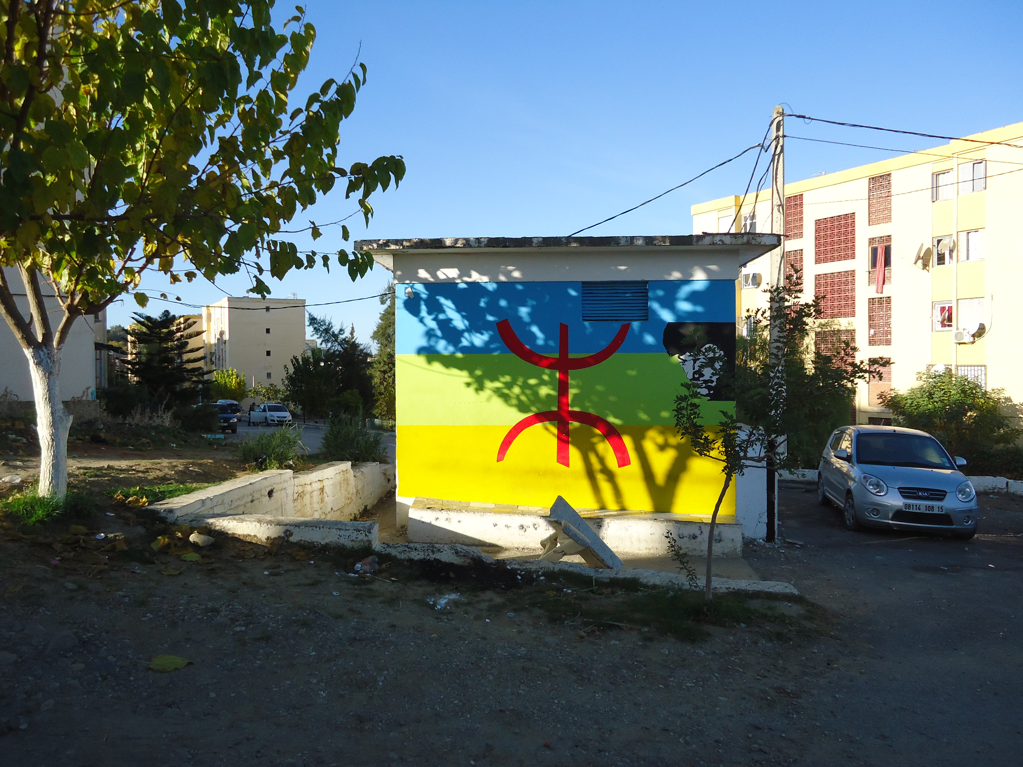 Peinture du drapeau Amazigh à Tizi Bouchene.